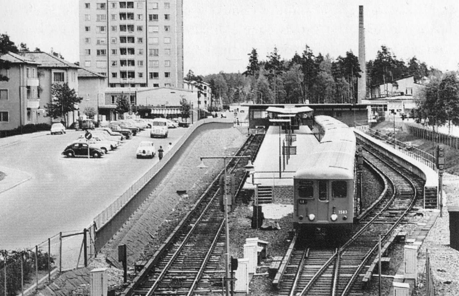 Bagarmossens tunnelbanestation